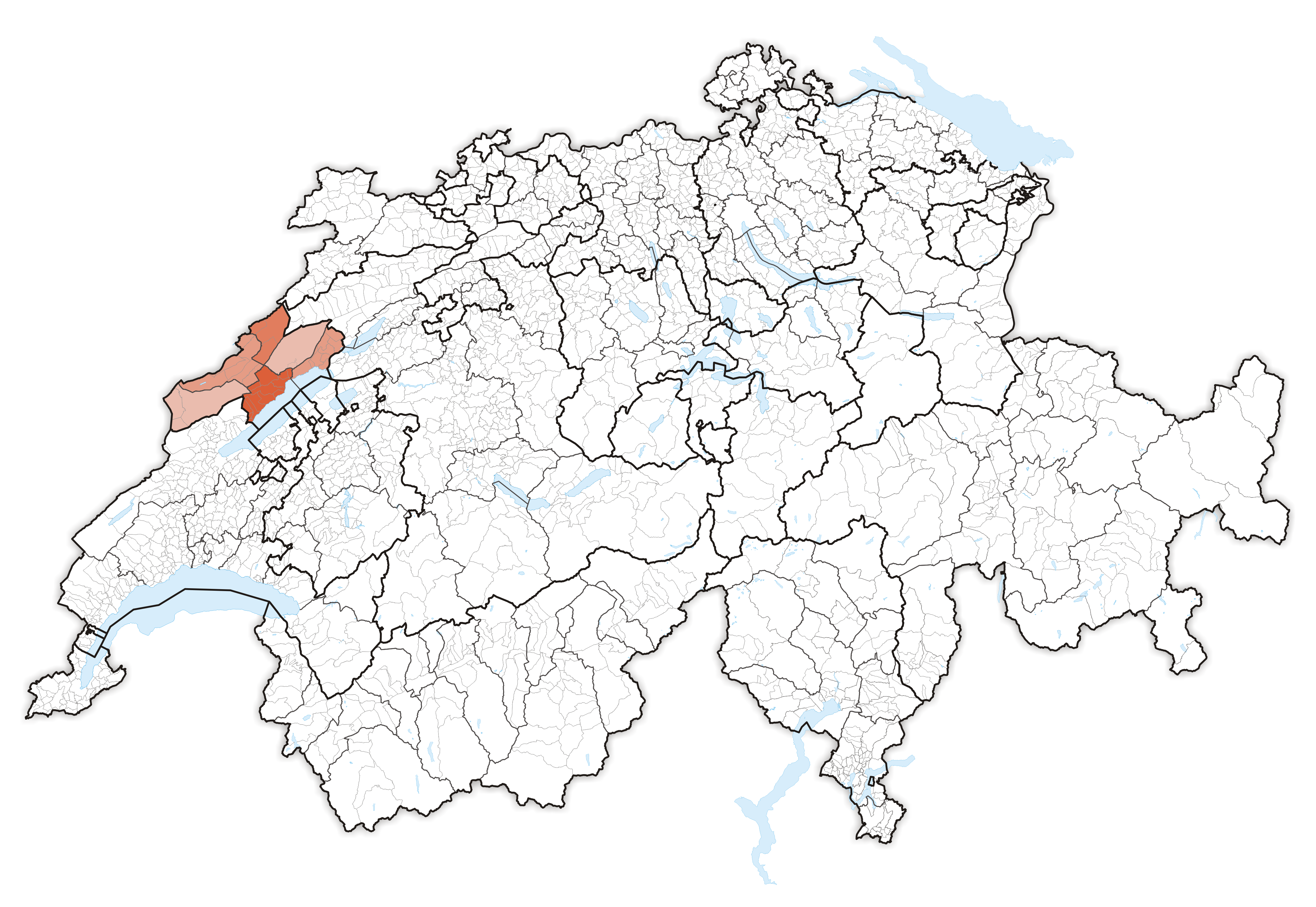 Canton Neuenburg